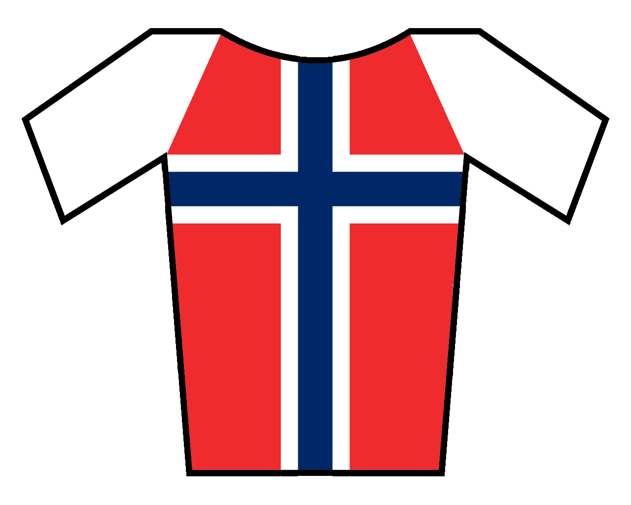 Maillot de Noruega